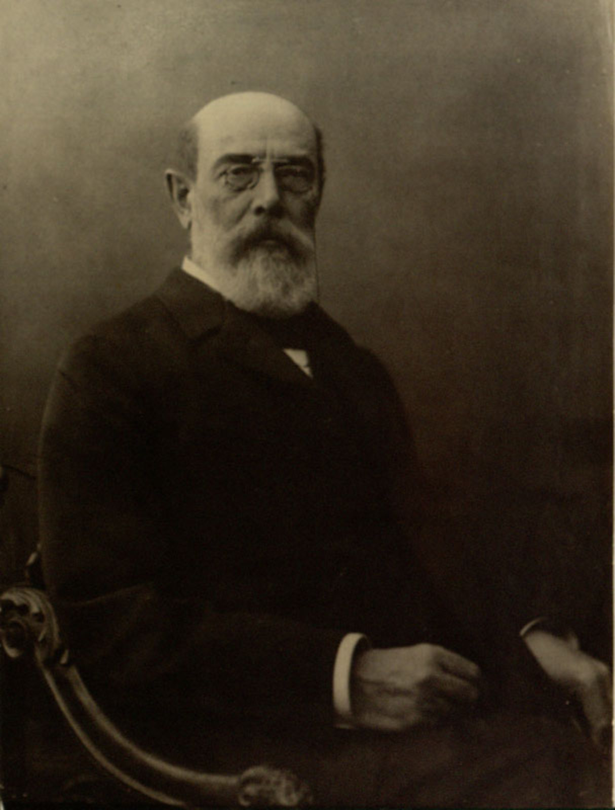 Carl Harry Ferdinand Rosenbusch, Mineraloge und Geologe, 1877–1908 Professor in Heidelberg